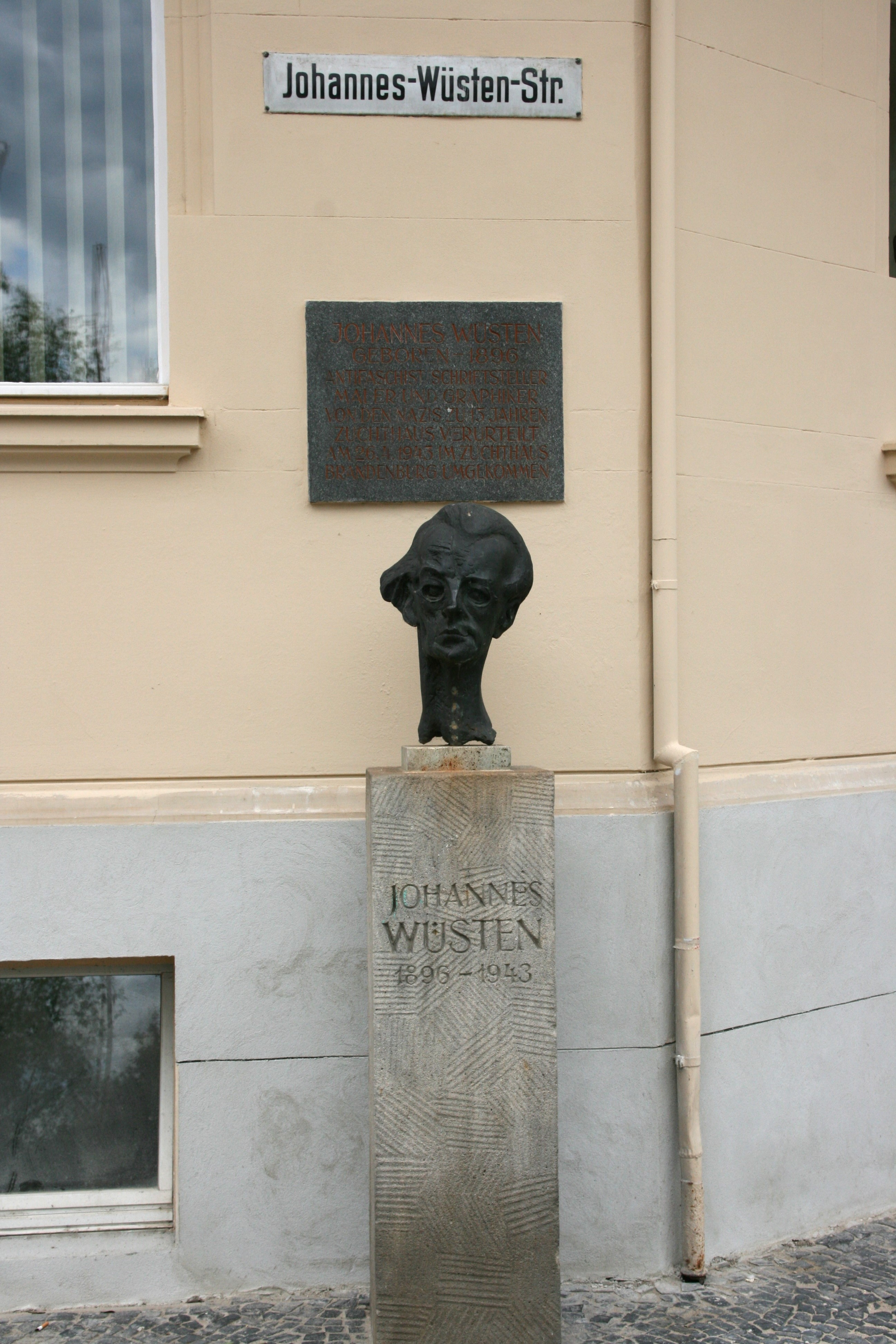 Johannes-Wüsten-Denkmal in der Johannes-Wüsten-Straße, vor Haus Joliot-Curie-Straße Nr. 4 in Görlitz